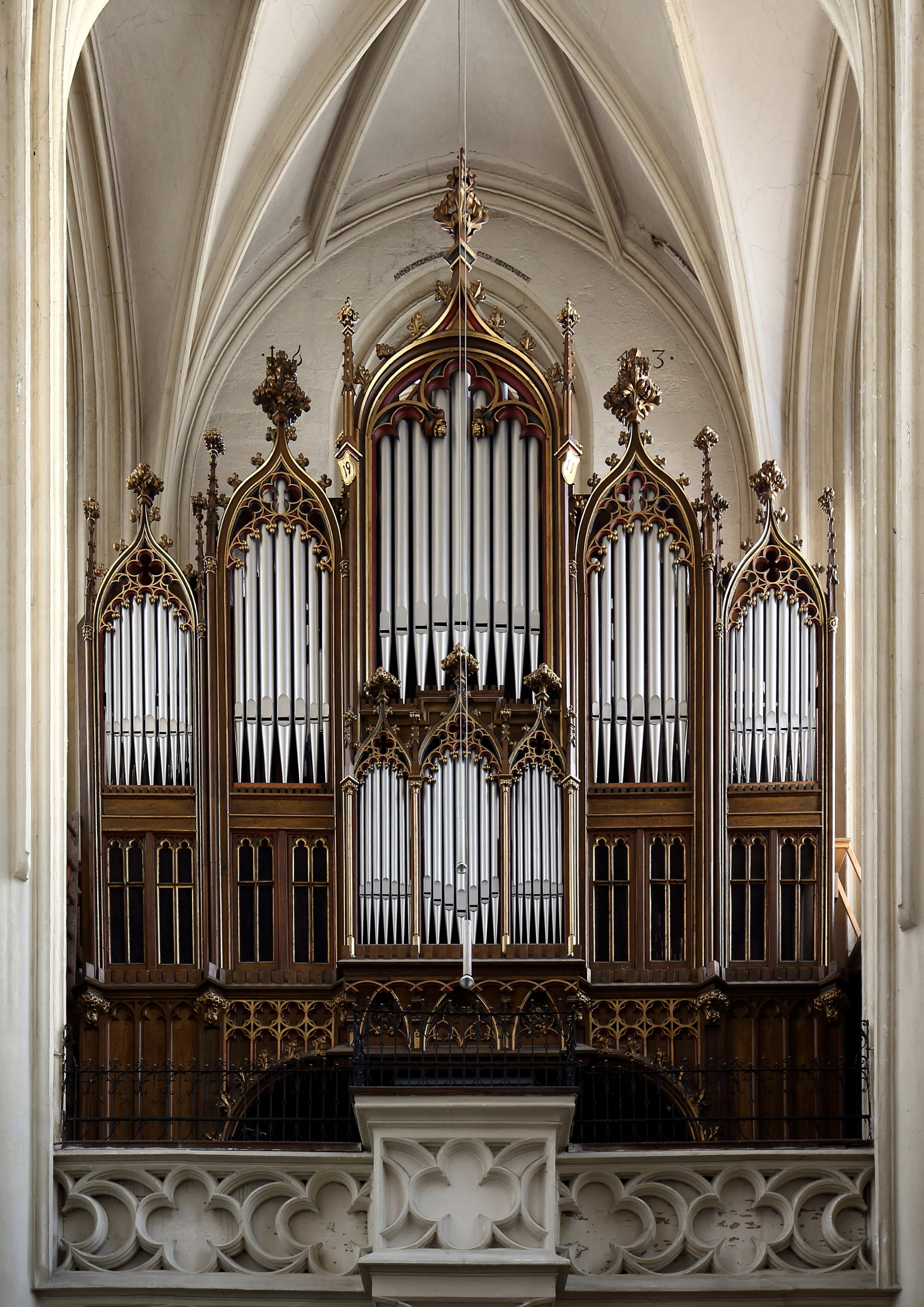 Orgel der Pfarrkirche Maria am Gestade in der österreichischen Bundeshauptstadt Wien. Ein Werk aus dem Jahre 1911 von dem Orgelbauer Matthäus Mauracher junior.